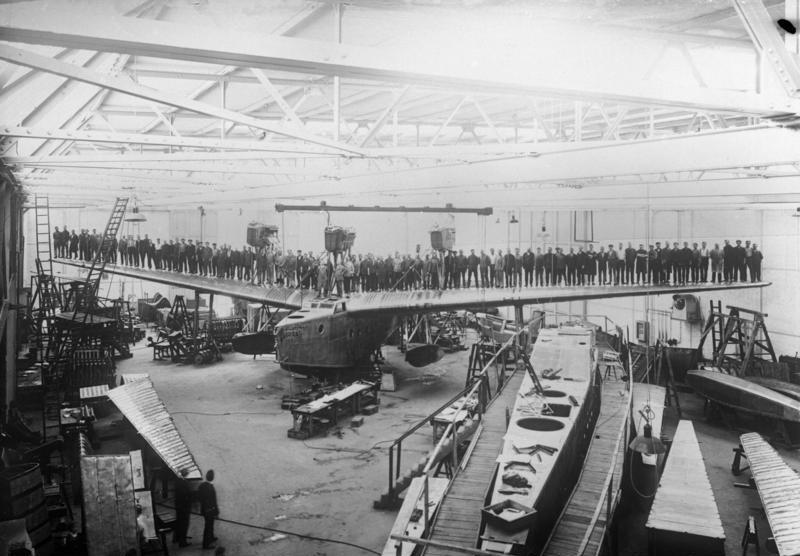 Eine interessante Flugzeugbelastungsprobe bei den Rohrbachwerken! Hundert Arbeiter in einem Gewicht von zusammen ca. 150 Zentner auf der Tragfläche eines Rohrbach-Riesen-Flugbootes, welches auf die Widerstandsfähigkeit der Tragflächen geprüft wird.